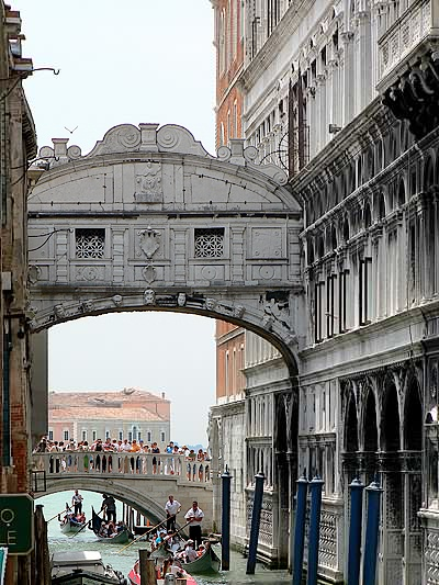 Vue du Pont des soupirs depuis le rio de palazzo o de canonica